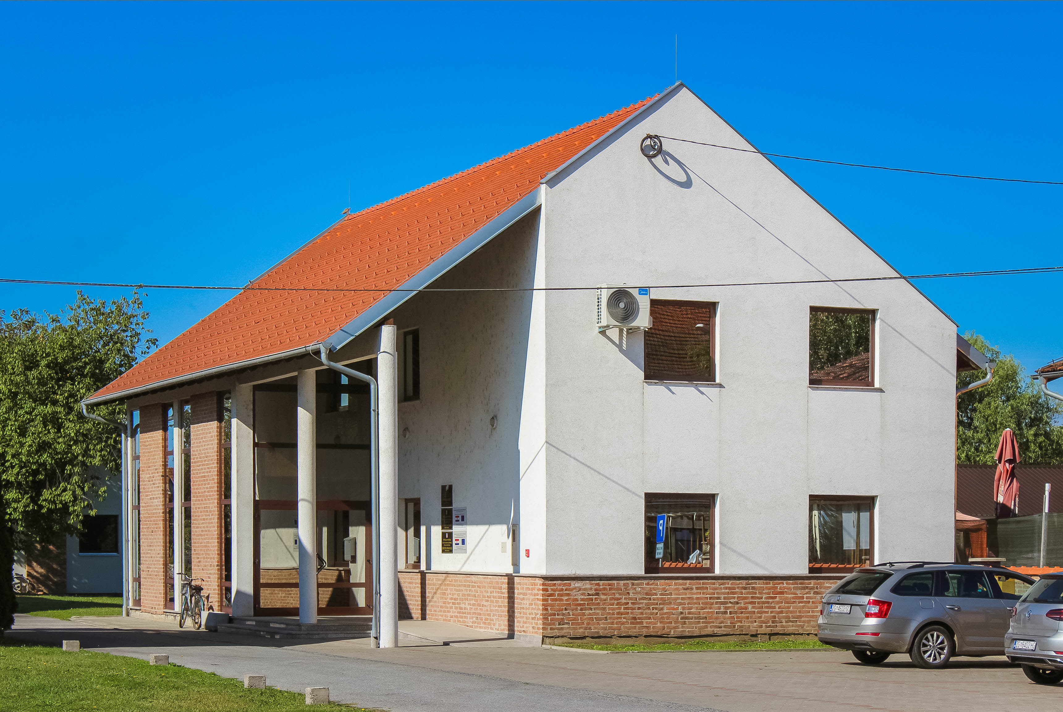 Upravna zgrada Općine Ernestinovo